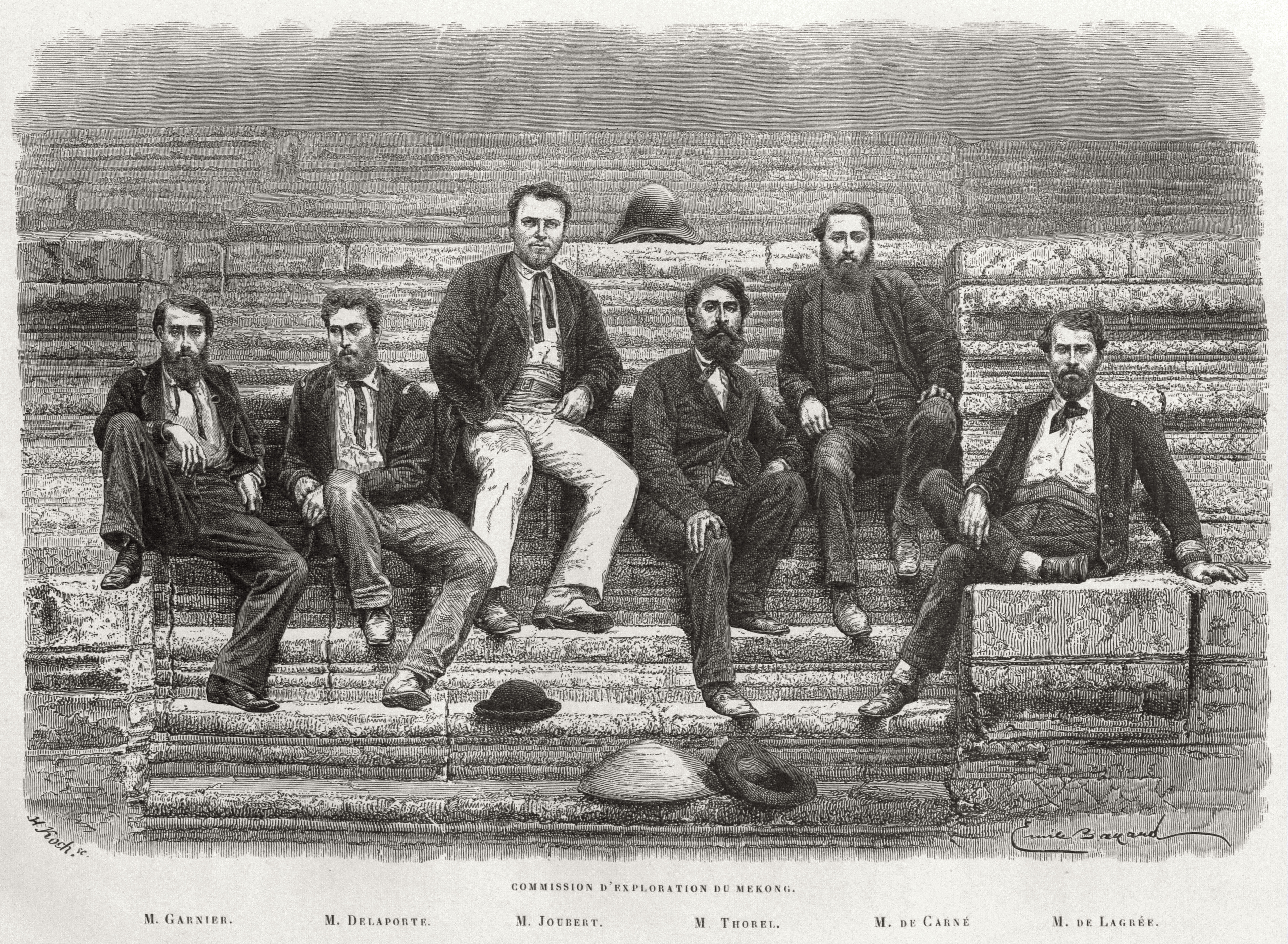 Commission de l'exploration du Mékong à Angkor Wat, 1866 from Voyage d'exploration en Indo-Chine vol. 1 f.p. 26